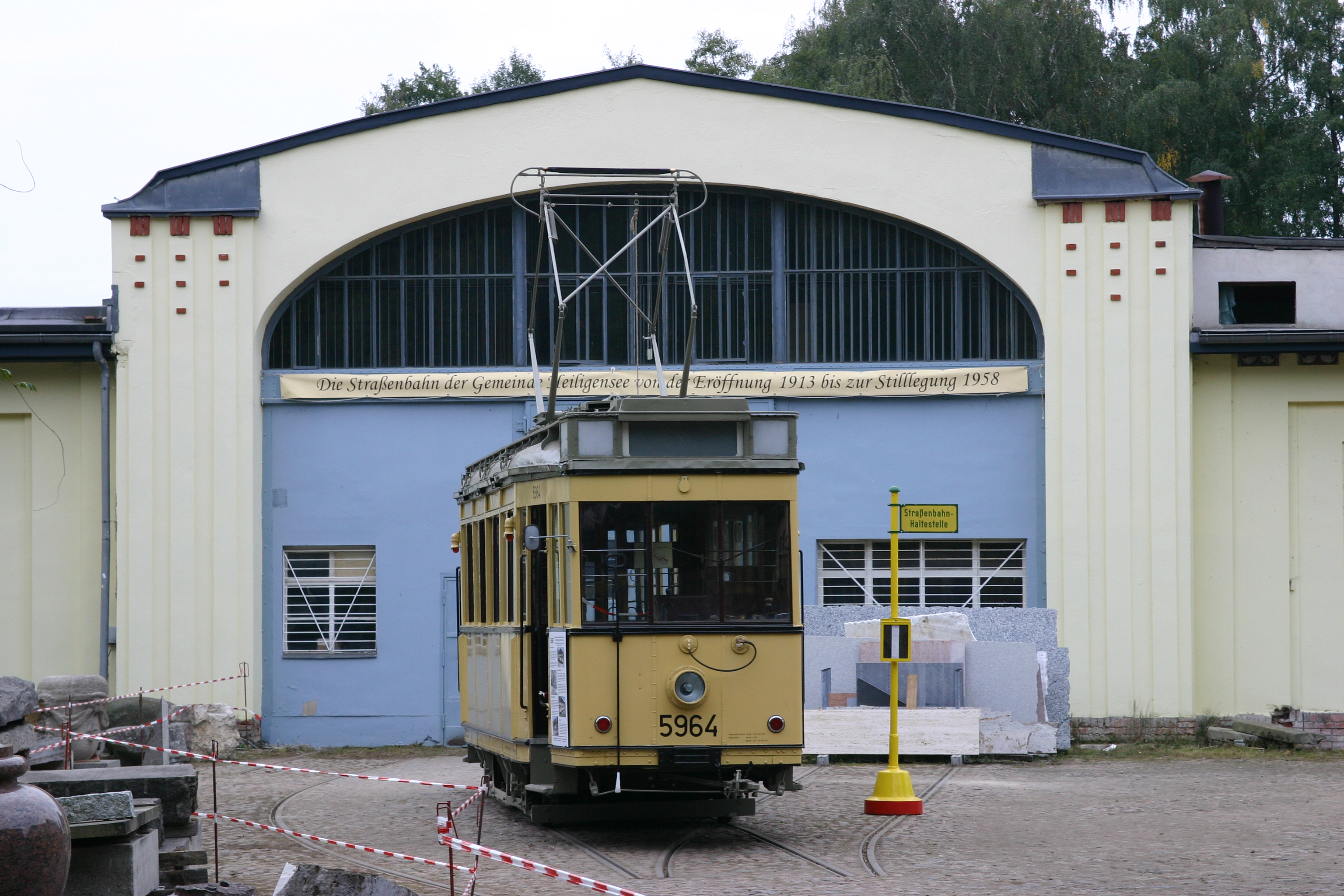 Berlin Tw 5964 Typ T 24 vor dem ehemaligen Straßenbahndepot in Berlin-Heiligensee 14.09.08